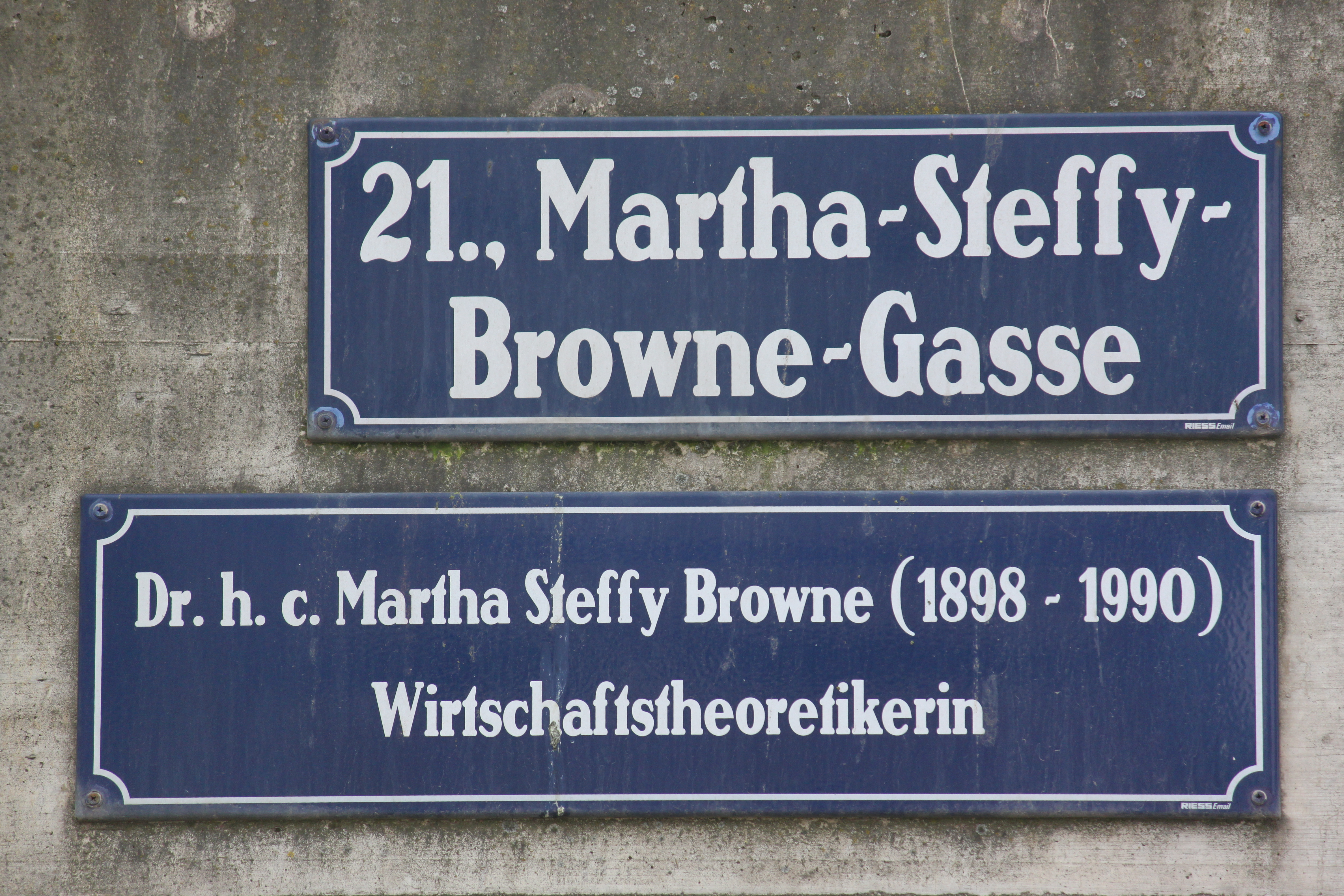 Martha-Steffy-Browne-Gasse, Beschriftung Brückenbauwerk der Floridsdorfer Hochbahn über die Brünnerstraße